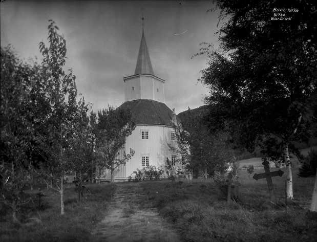 Buvik kyrkje